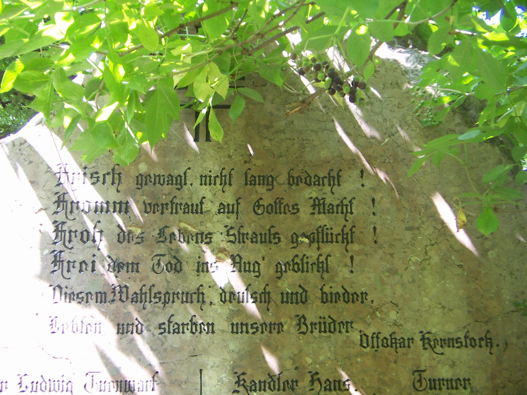 Kriegerdenkmal Erster Weltkrieg, 1920 errichtet, neben der Schwarzenbergallee im Schwarzenbergpark in Hernals